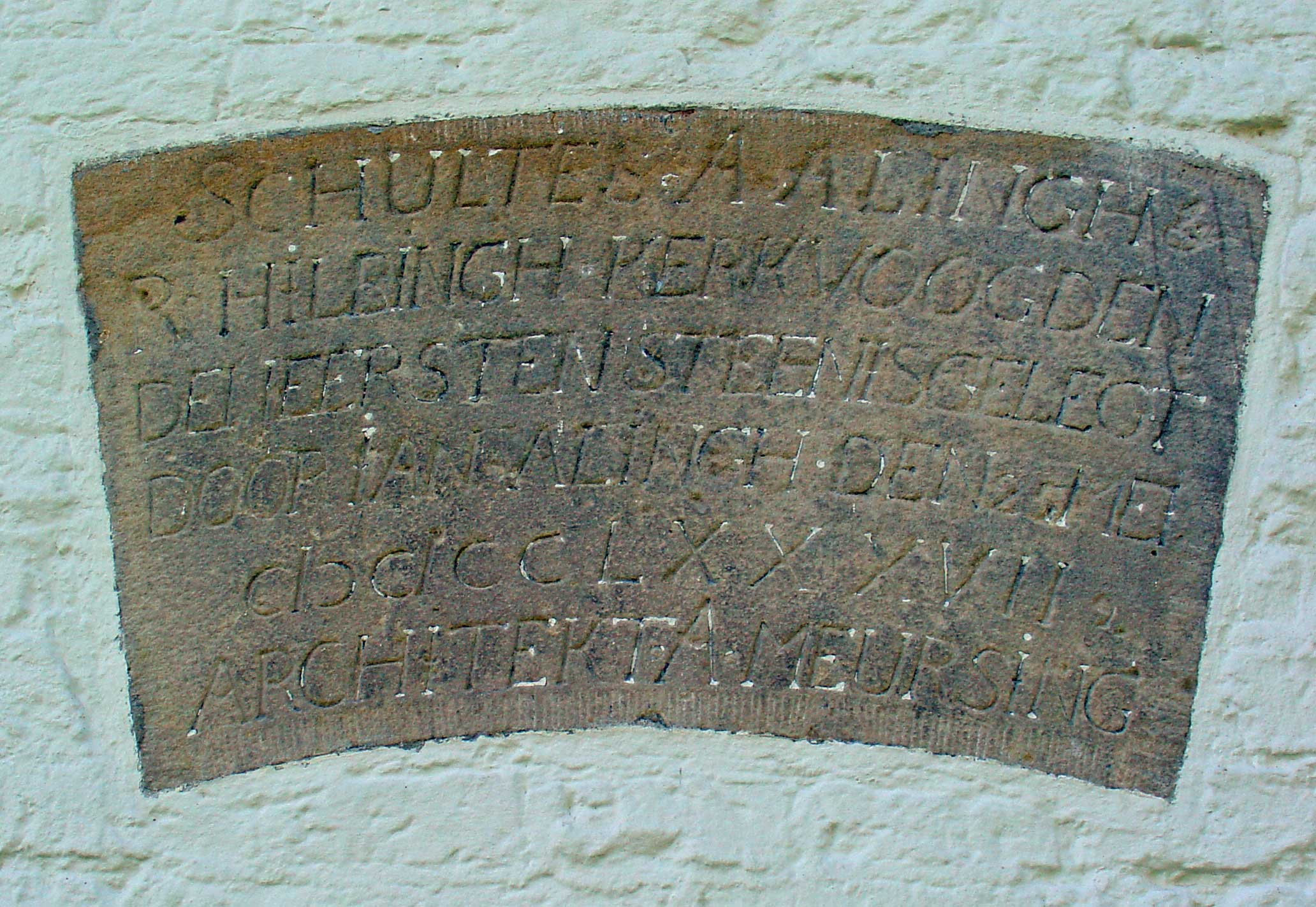 Steen gelegd door Jan Alingh in 1787 in de muur van de kerk van Gasselte (de Mariakerk) als herinnering aan de toenmalige verbouwing